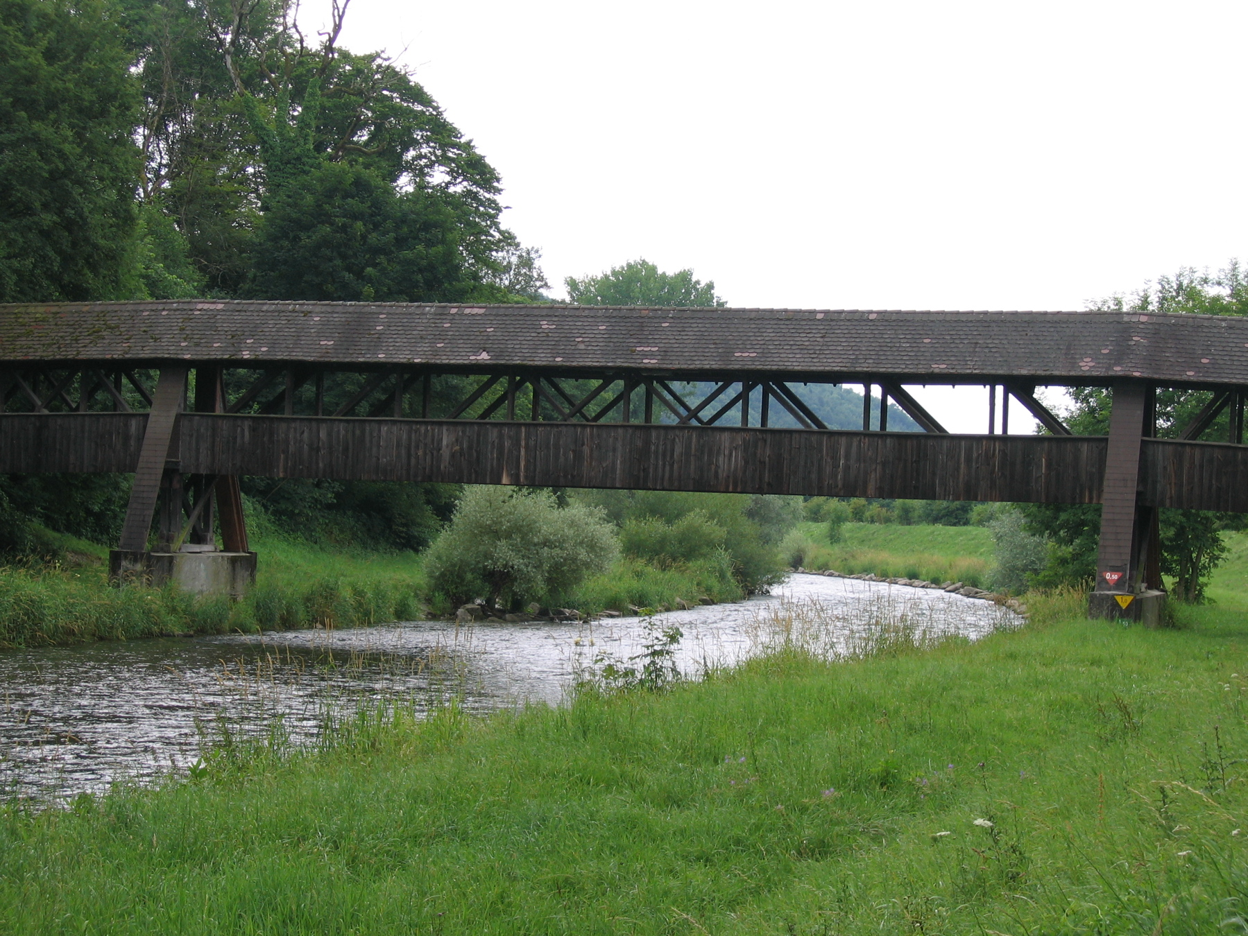 Holzbrücke über die Wutach in Tiengen, Landkreis Waldshut, am alten Weg aus der Stadt nach Kadelburg (Küssaberg).